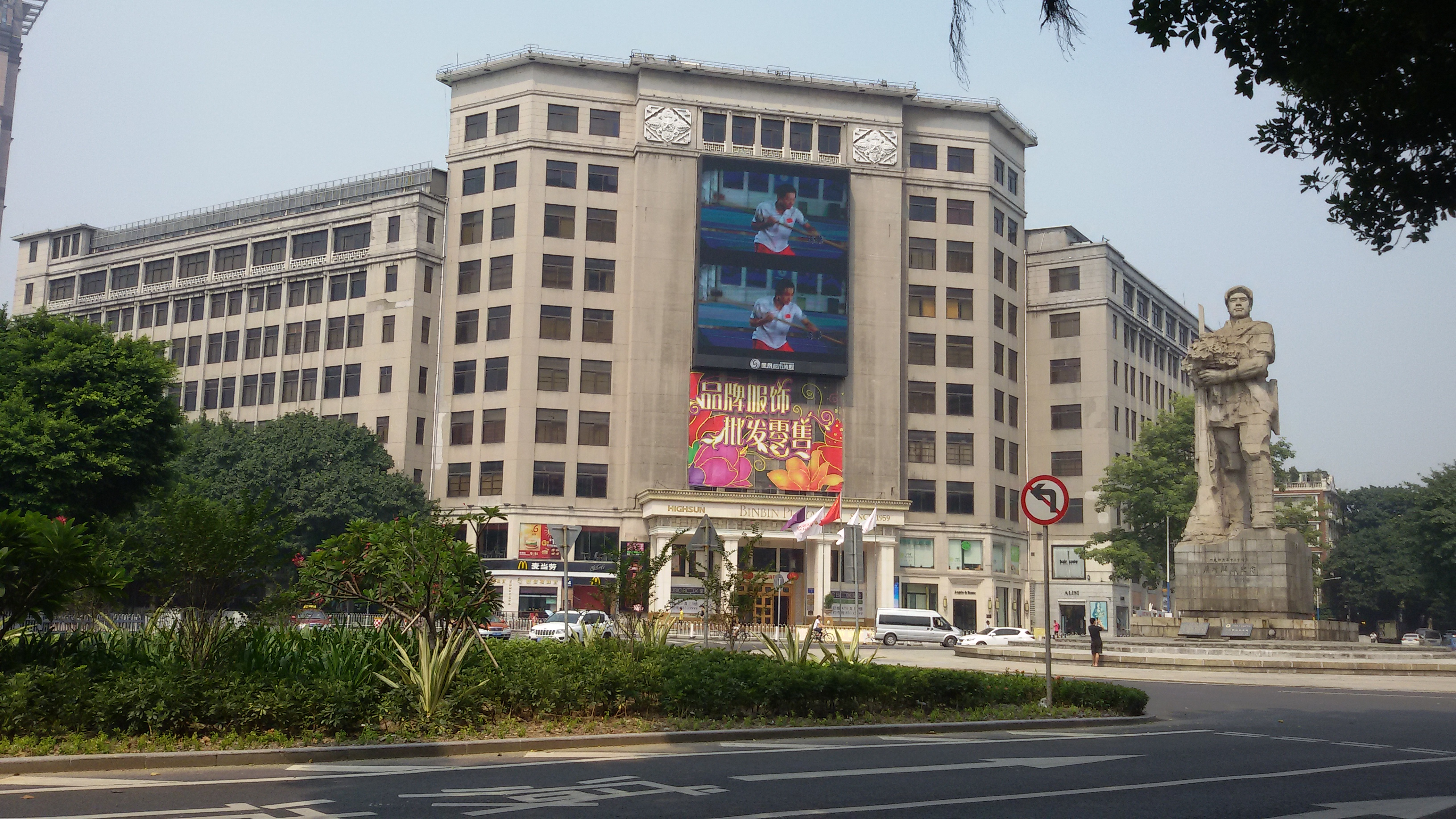 粵語: 海印缤缤广场